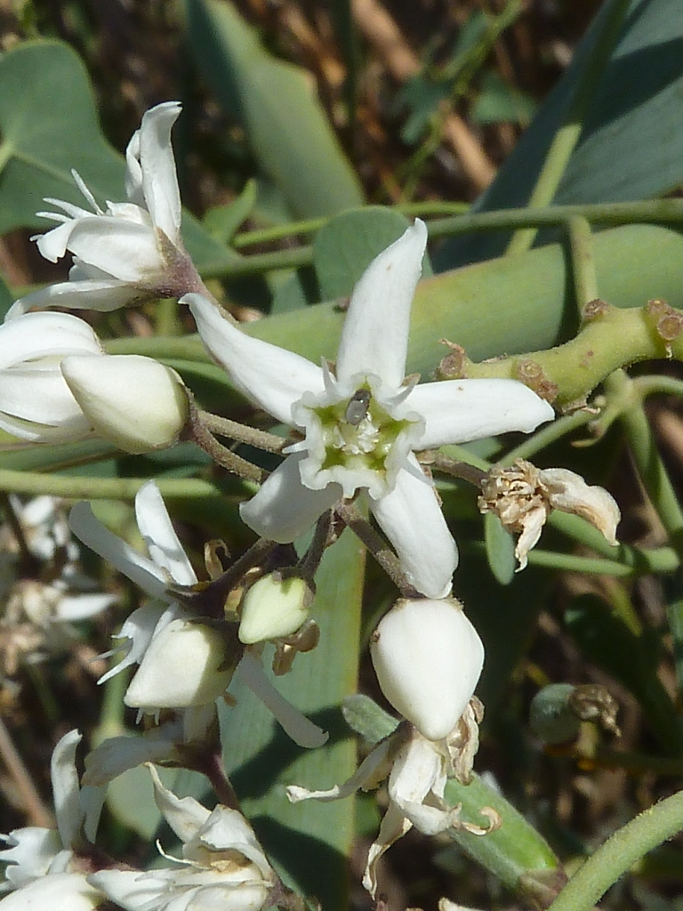 Cynanchum acutum (Matacán): inflorescencia, detalle - La Huerta/Camino de la Azarbe de Patricio - Albatera (Alicante, España).